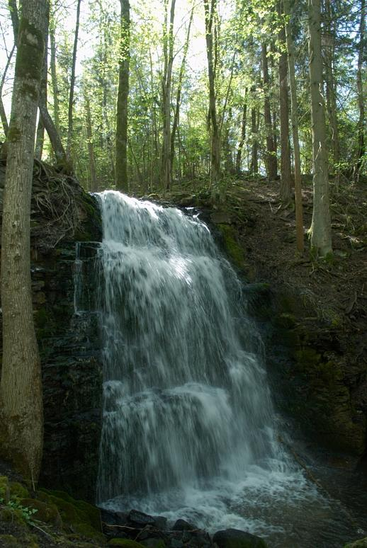 Vid Silverfallet i Karlsforsbäcken kastar sig bäcken på våren sammanlagt ca 50 meter i forsar och fall från avsats till avsats. Utmed sluttningen finns övergivna brott av kalksten och alunskiffer. Längs bäcken finns lämningar av Karlsfors alunbruk och kalkbruk. Området ingår i EU’s ekologiska nätverk av skyddade områden, Natura 2000. Motiv: Silverfallet Nyckelord: Naturreservat, Riksintressen Kategori: Skogslandskap Vid Silverfallet i Karlsforsbäcken kastar sig bäcken på våren sammanlagt ca 50 meter i forsar och fall från avsats till avsats. Utmed sluttningen finns övergivna brott av kalksten och alunskiffer. Längs bäcken finns lämningar av Karlsfors alunbruk och kalkbruk. Området ingår i EU’s ekologiska nätverk av skyddade områden, Natura 2000.